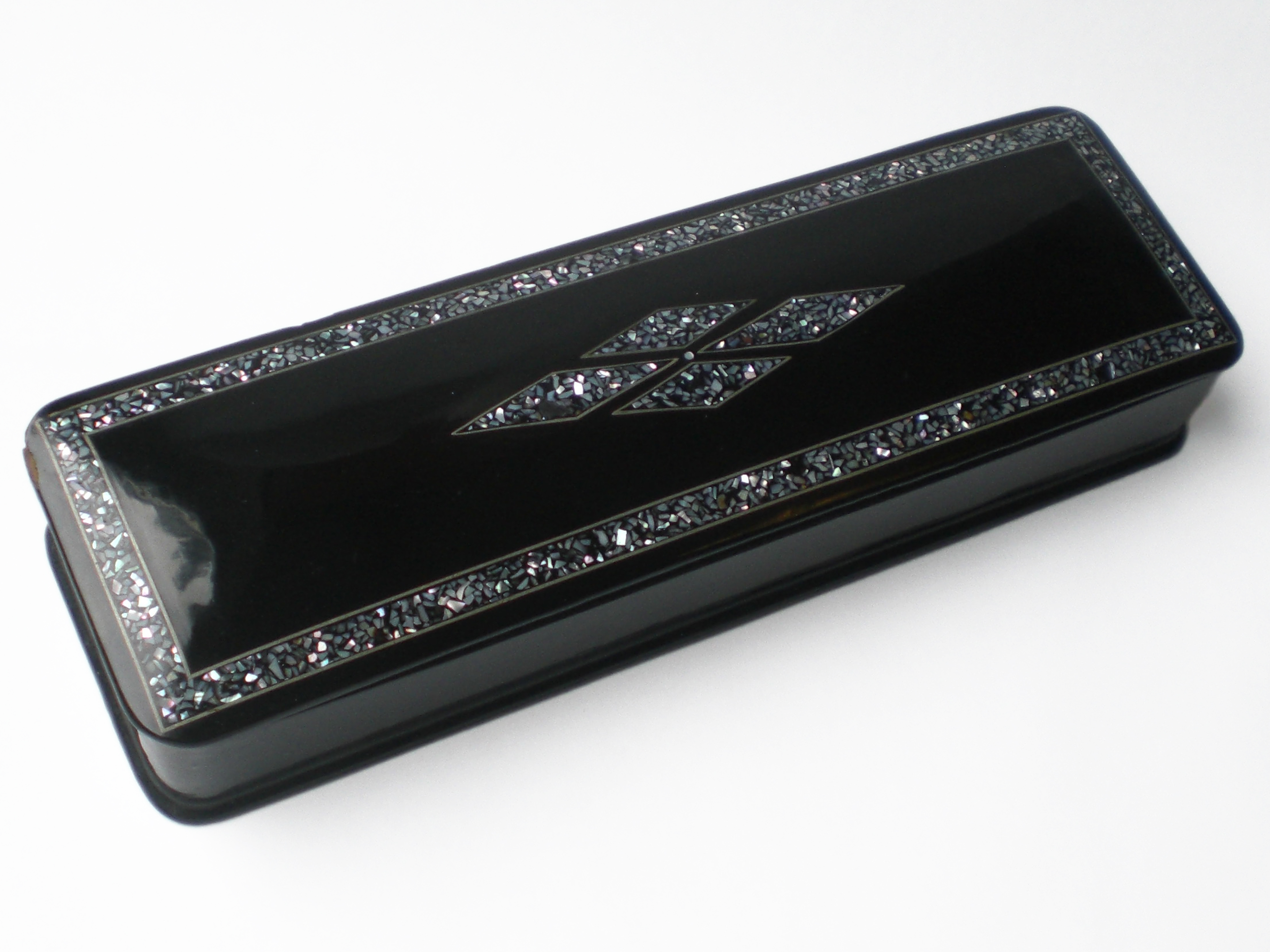 Handschuhkasten aus Pappmaché mit ornamentalen Einlegearbeiten, Ende 19. Jhdt., Saarland oder Frankreich. Second Empire.